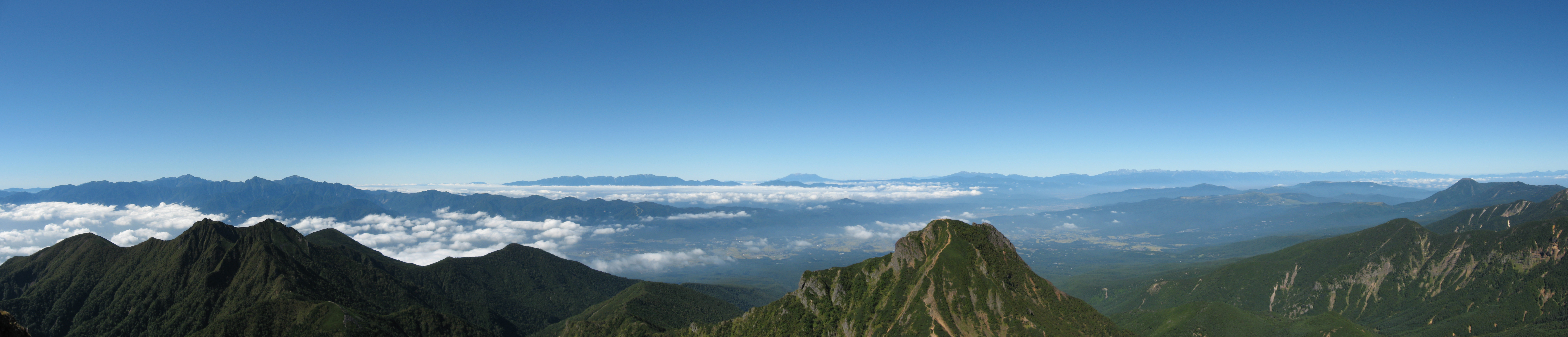 赤岳からの眺望